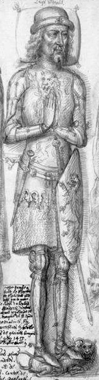 Louis II of Flandre